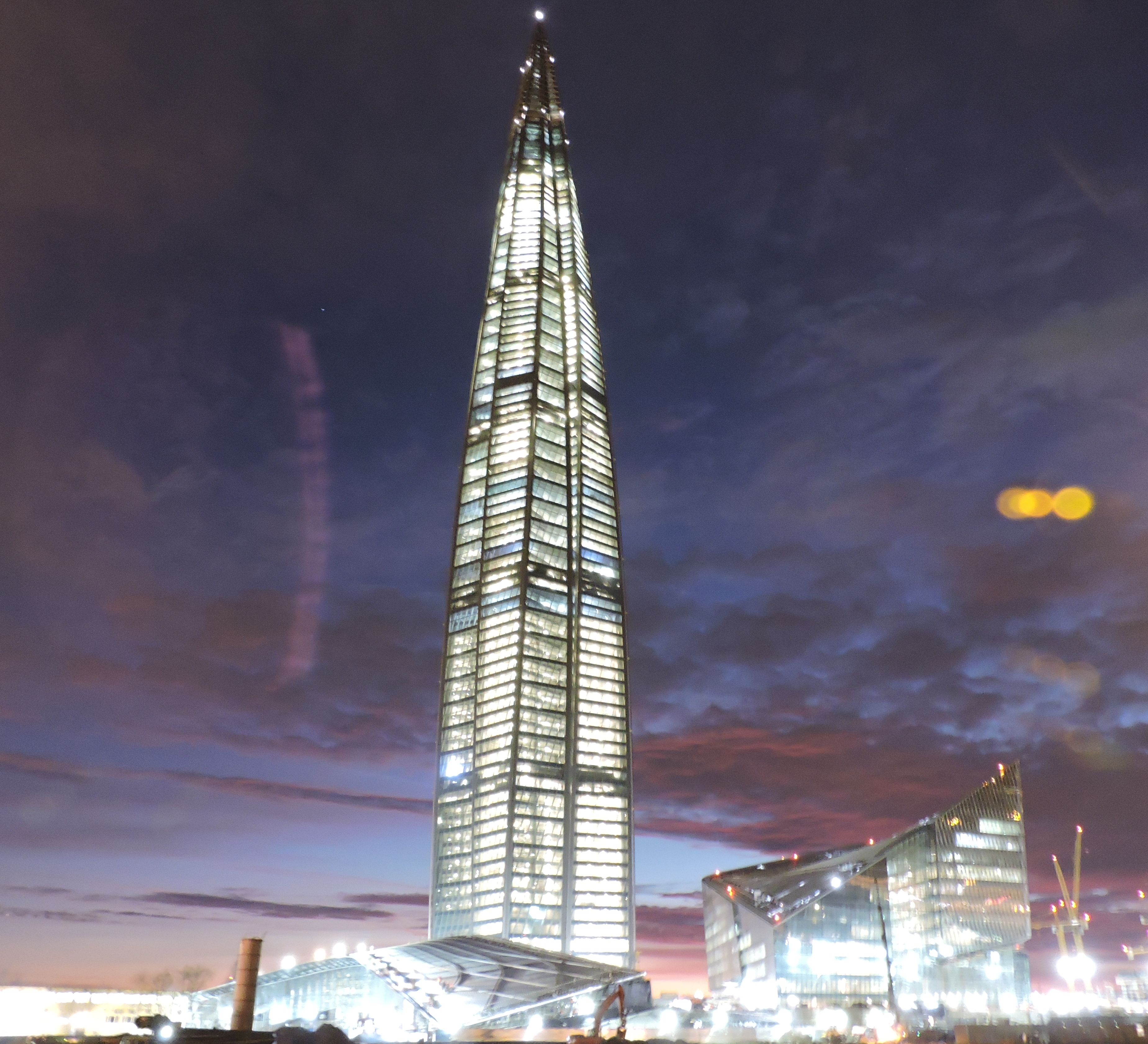 Лахта-центр 30 ноября 2018